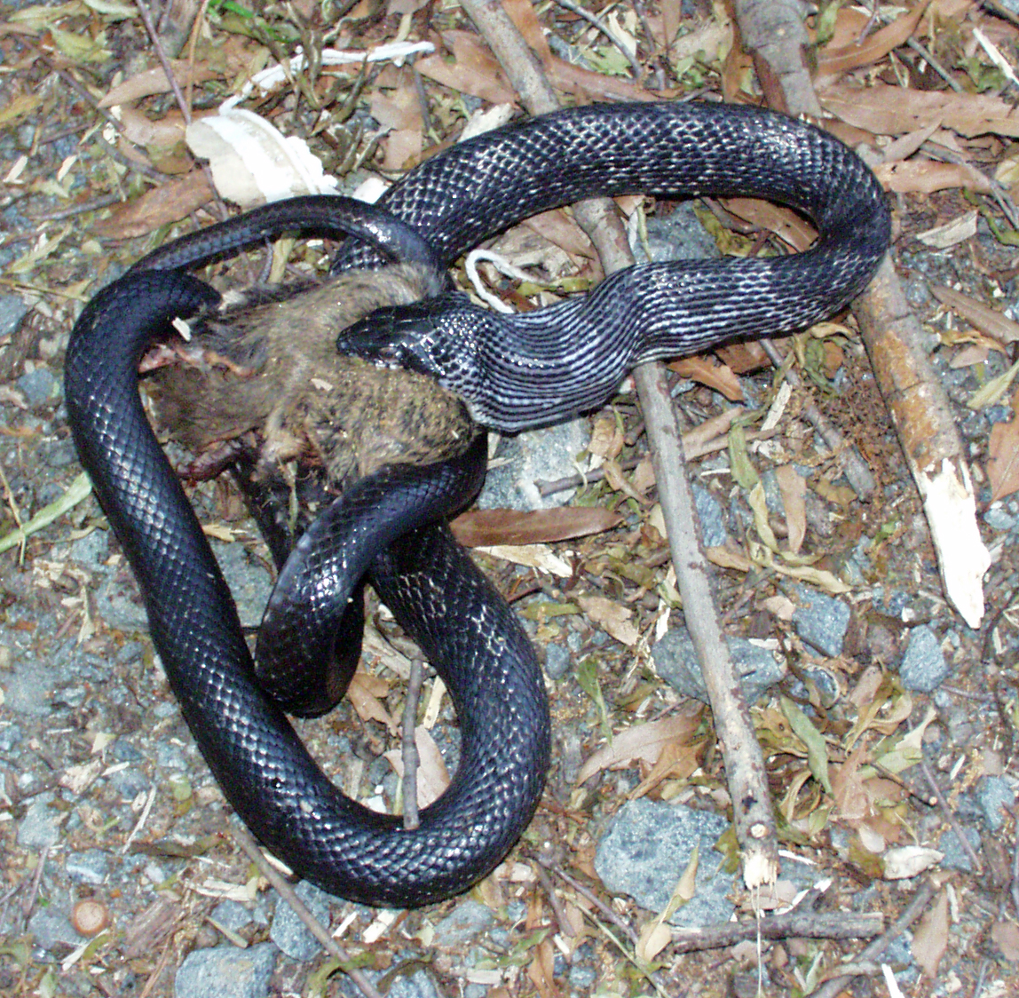 Elaphe obsoleta obsoleta